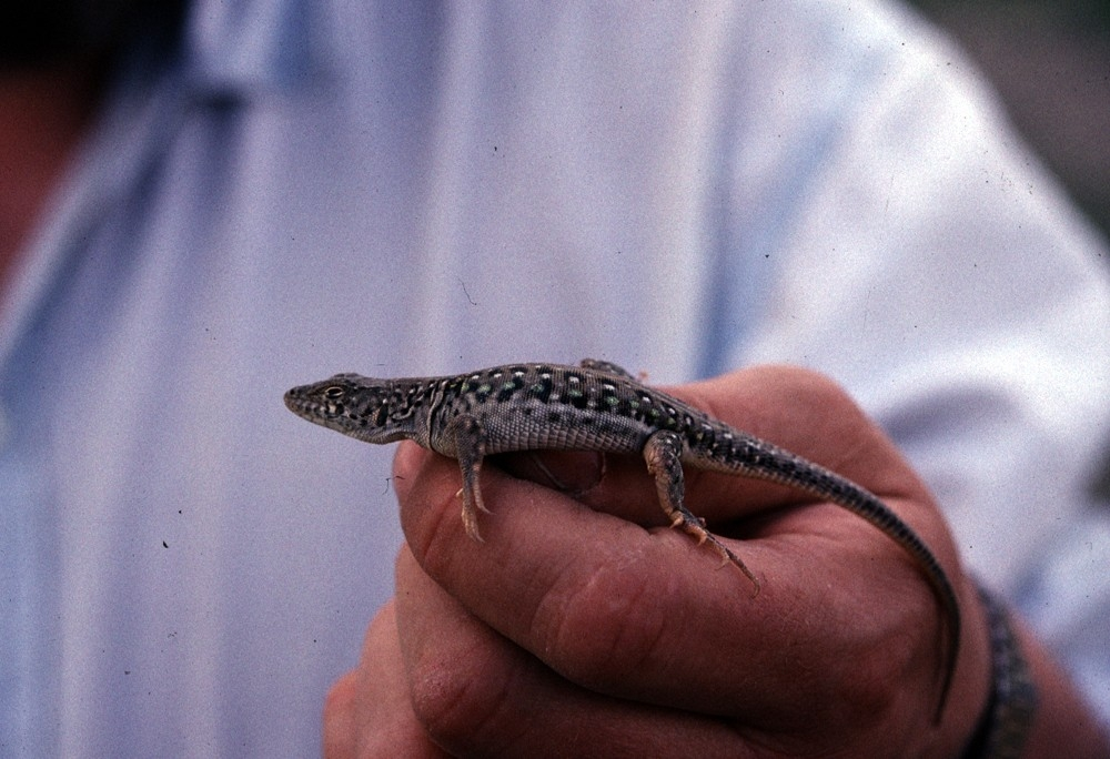 Eremias strauchi. Turkiet 10 km S. Igdir, towards Ararat, prov. Kars Samlingar av Naturhistoriska museet i Göteborg.